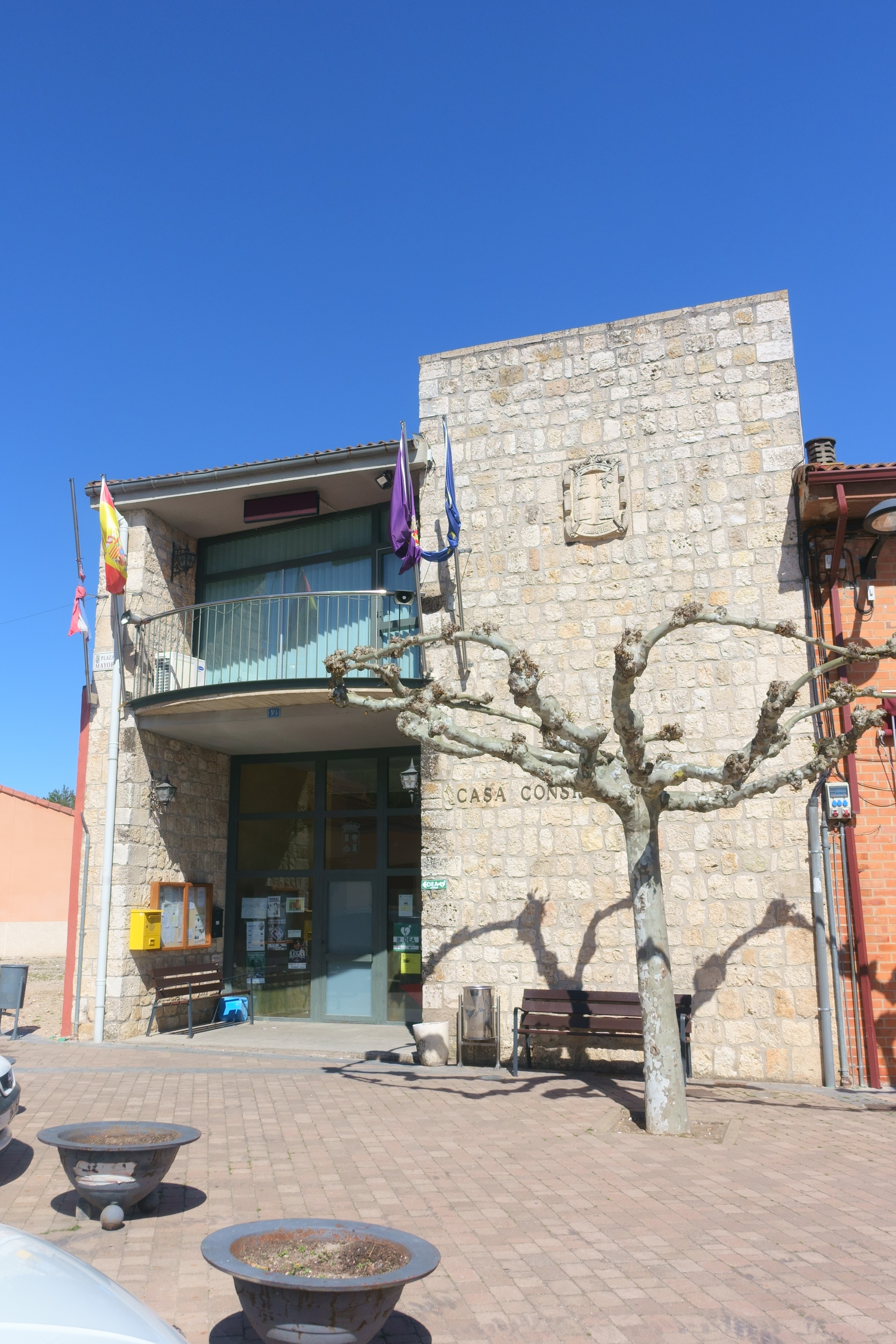 Casa consistorial de Villariezo (Burgos, España).